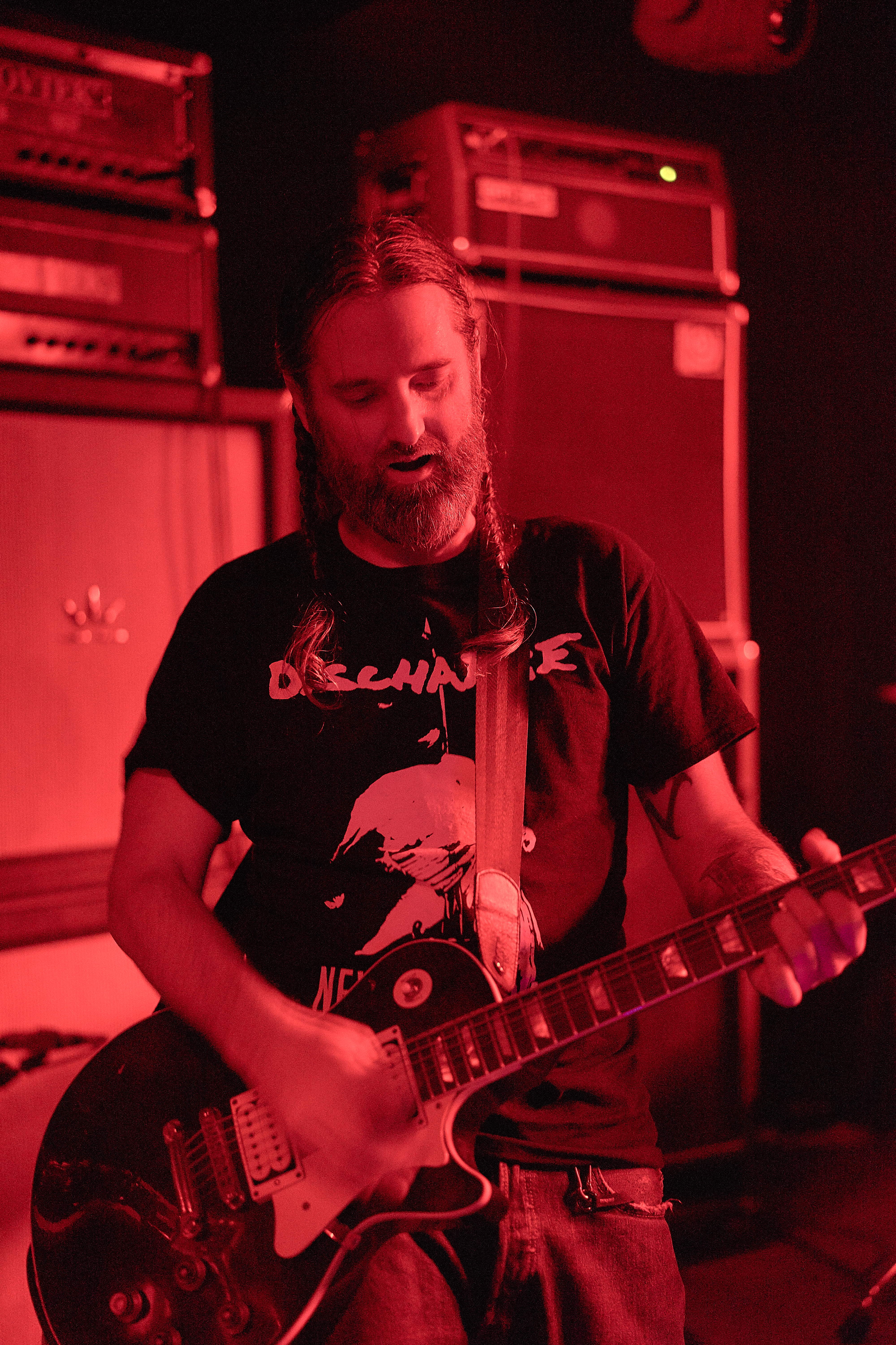 Mannheim based Sludge / Doom band Black Shape of Nexus" live @ Cassiopeia Berlin 2016-01-28